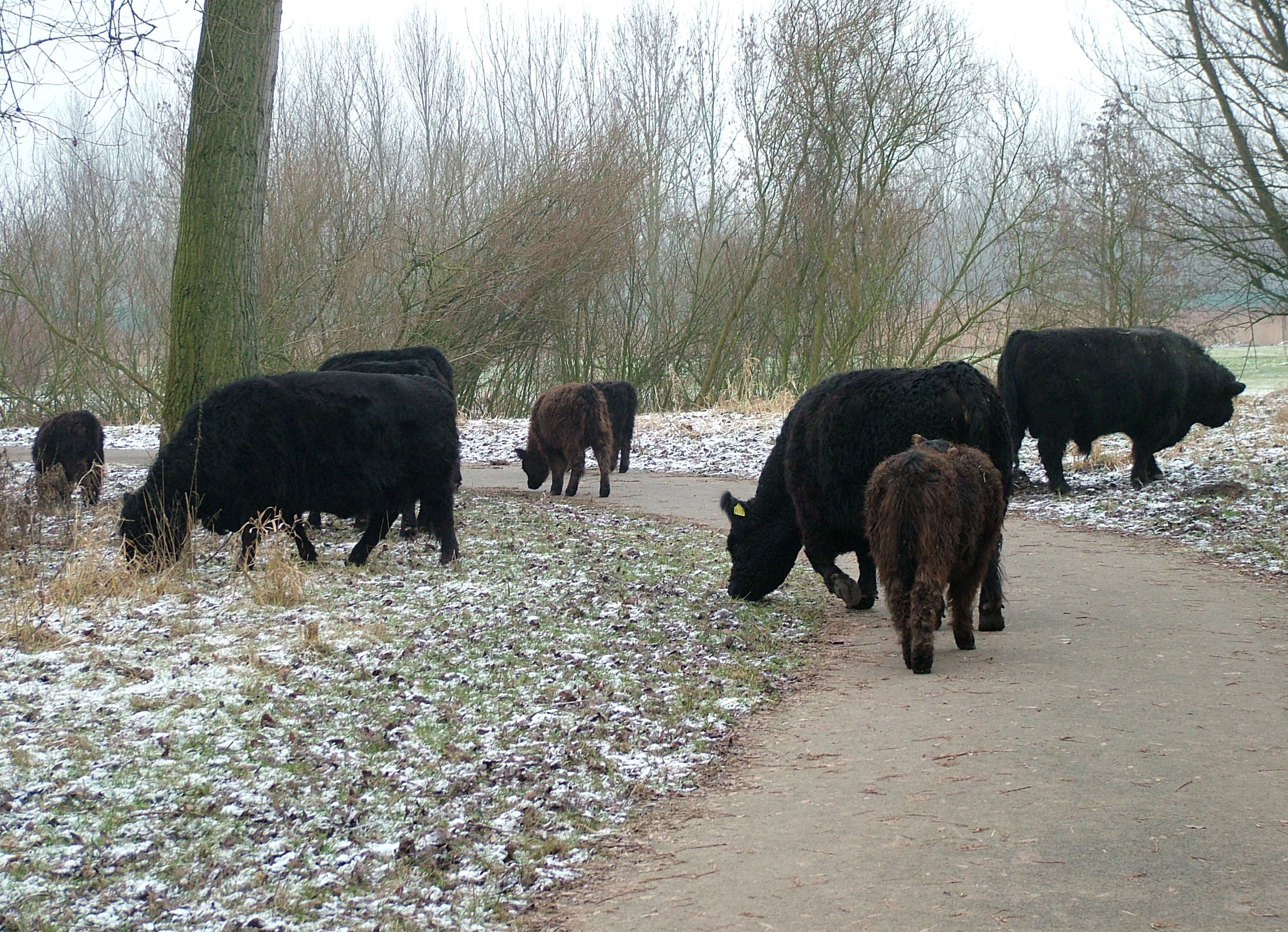 Galloways in Alphen aan den Rijn, tussen golfplaats en Zegerplas